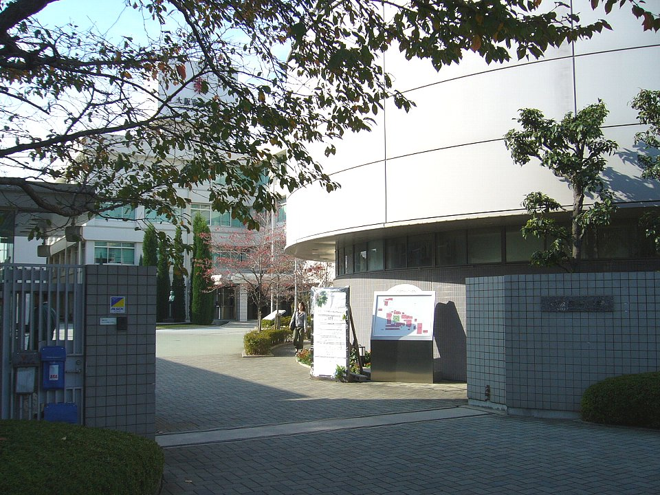 大阪音楽大学 - 2006年11月16日 Bakkai撮影